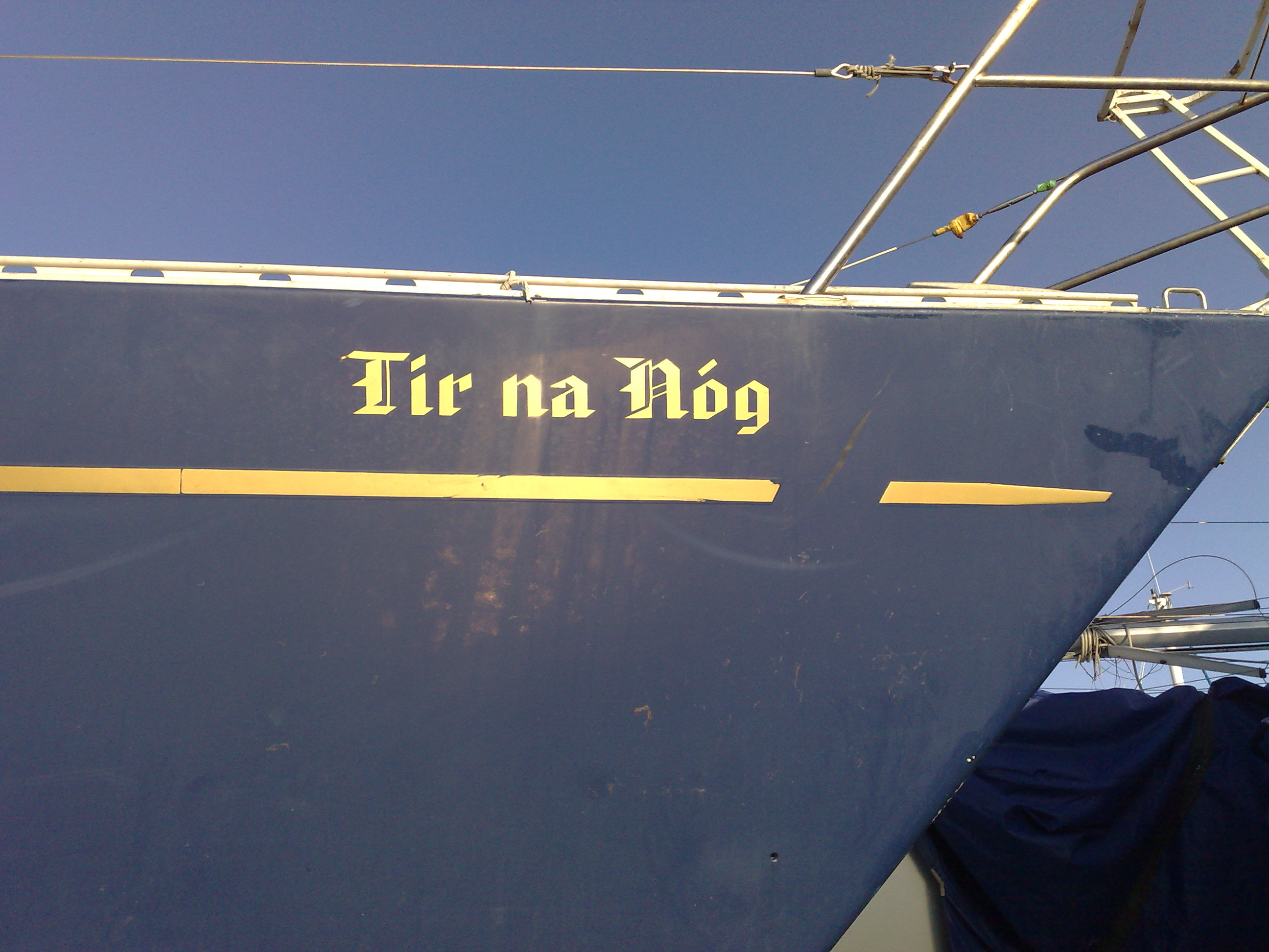 Schriftzug Tír na nÓg auf einem irischen Fischerboot